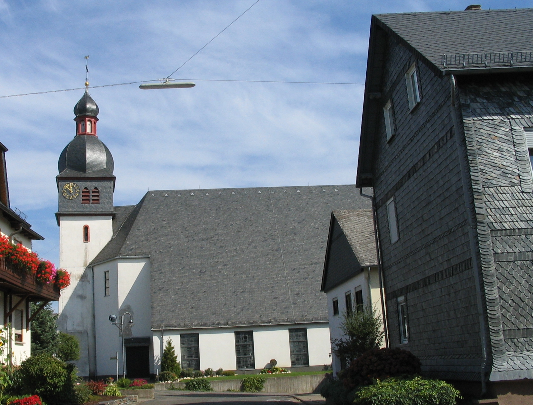 Kirche Mastershausen